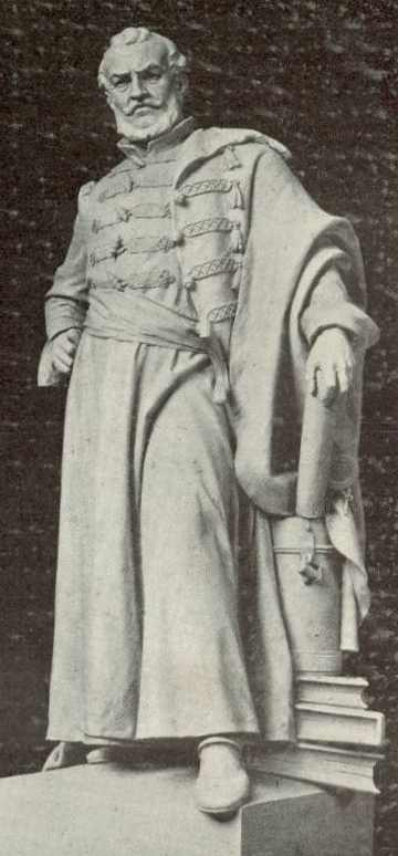 Werbőczy István jogtudós, a Tripartitum szerzője szobra Budapesten. Donáth Gyula alkotása. A szobrot 1945-ben ledöntötték.